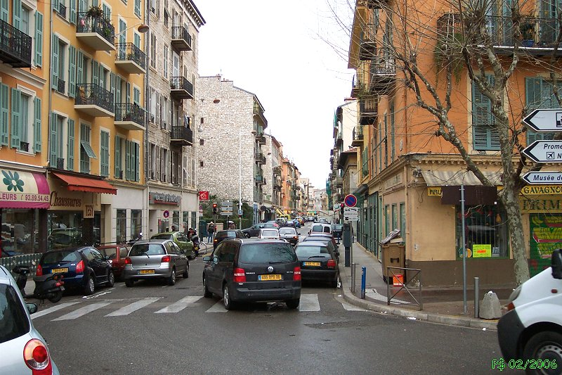 La rue Bonaparte à son départ de la Place Max-Barel.